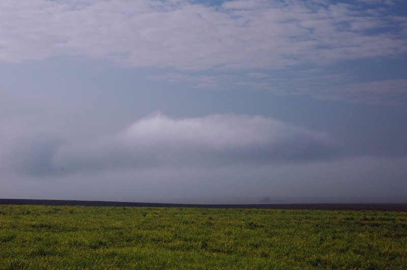 Stratocumulus lenticularis cloud, Letničie, Slovakia